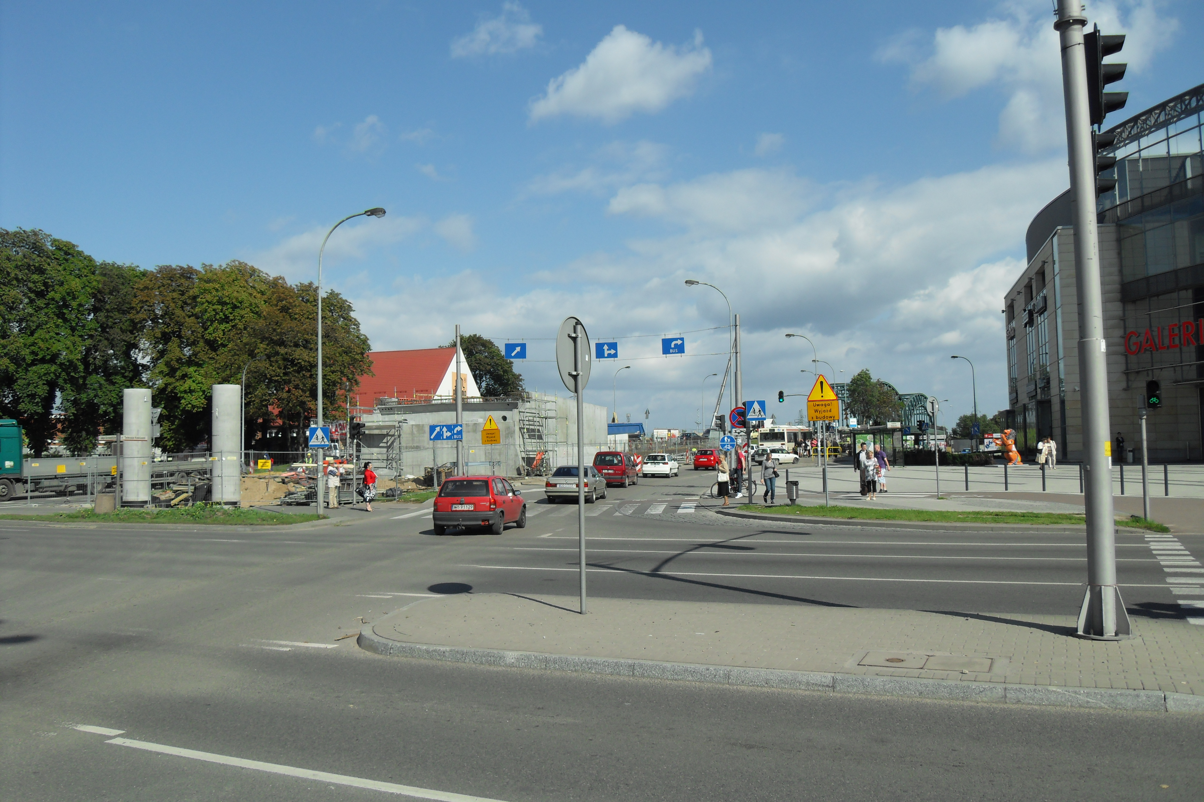 Gdańsk Wrzeszcz, nowy wiadukt w budowie.